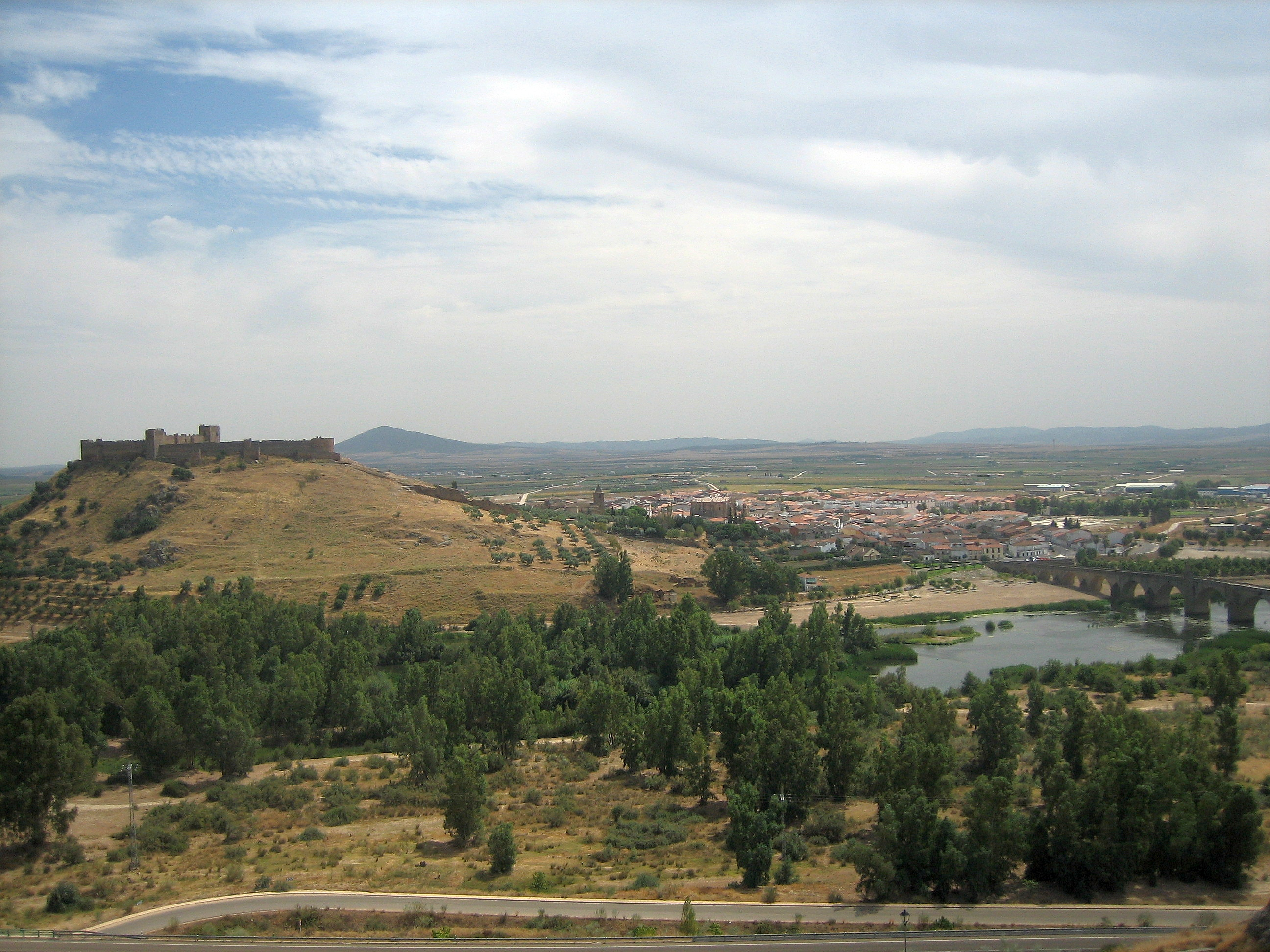 Foto tomada desde un restaurante situado en un monte opuesto en la sierra de Enfrente.